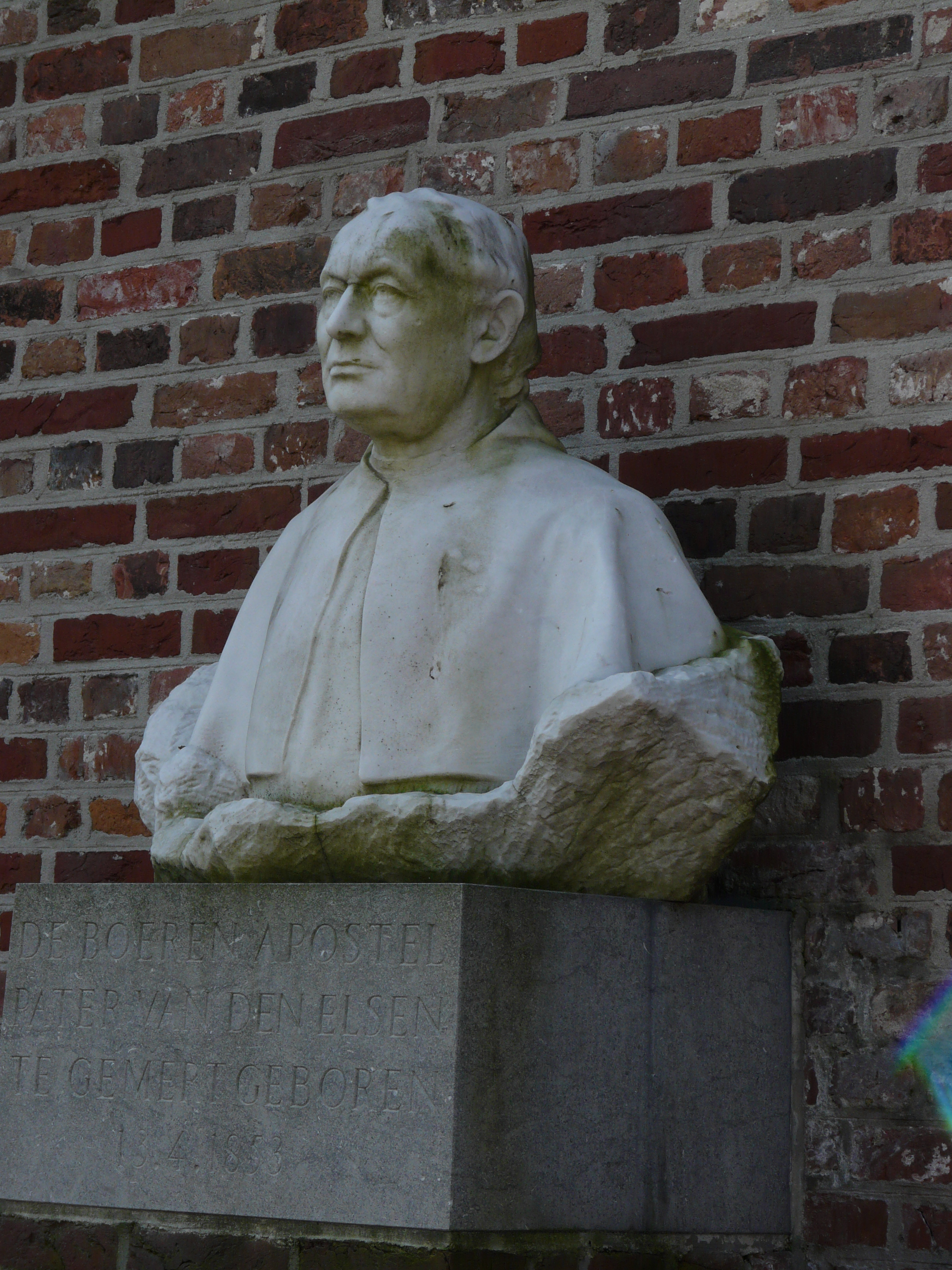 Buste-beeld van boerenapostel Pater van den Elsen tegen de Kerk van Sint-Jans Onthoofding in Gemert